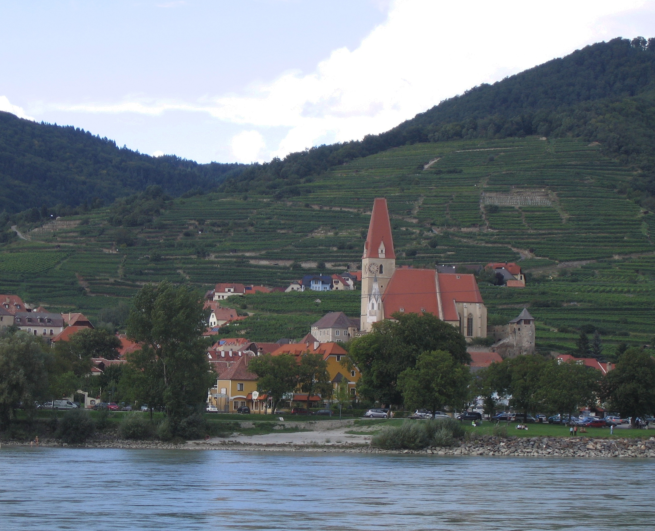 Weißenkirchen in der Wachau, Austria